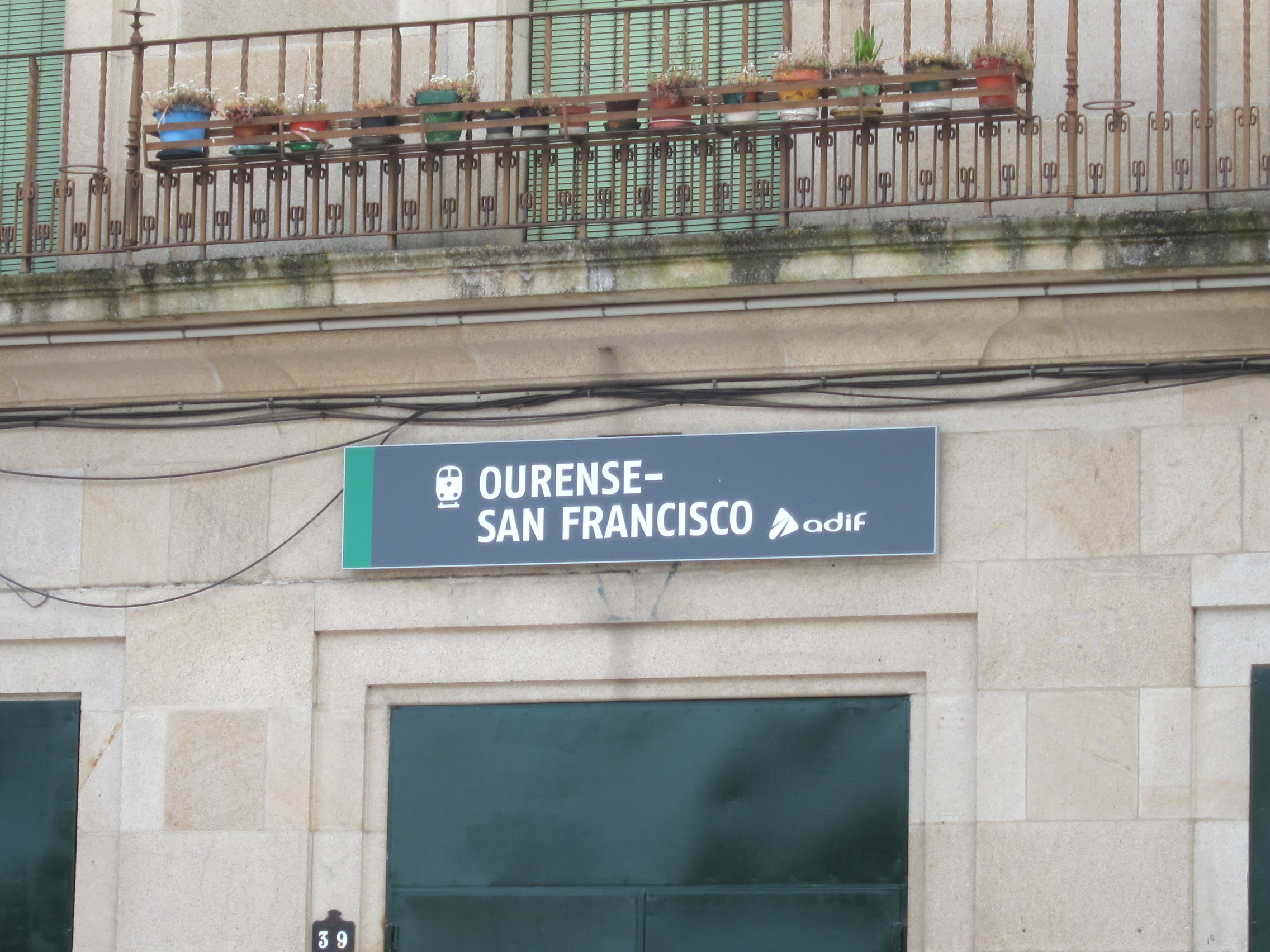 Señalización de la estación de Orense-San Francisco